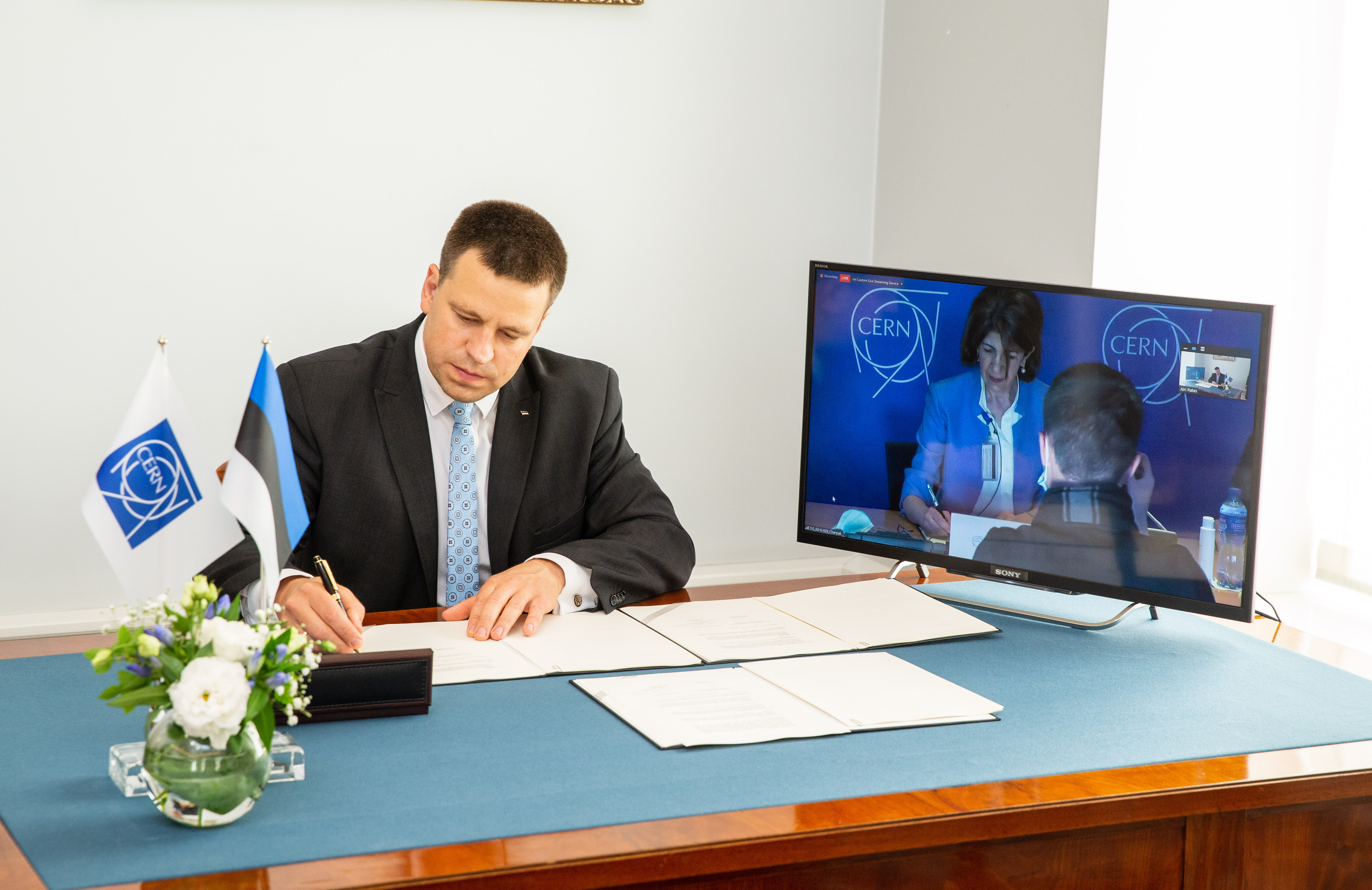 CERNi liitumisleppe allkirjastamine 19. juunil 2020.